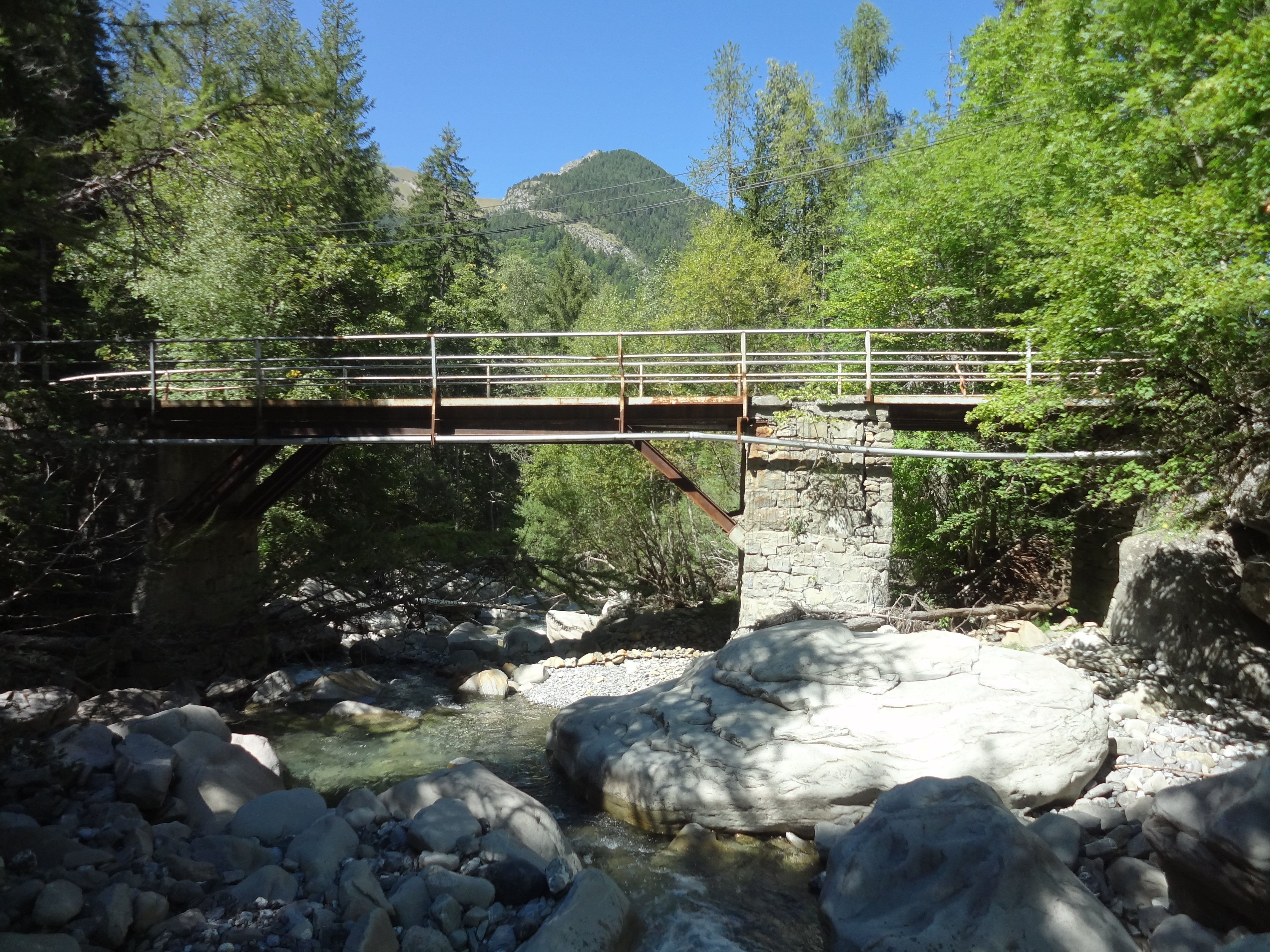 Pont de Baud, sur la Blanche de Laverq, à l'entrée du vallon de Laverq, commune de Méolans-Revel (Alpes-de-Haute-Provence), à proximité de la maison Gilly.